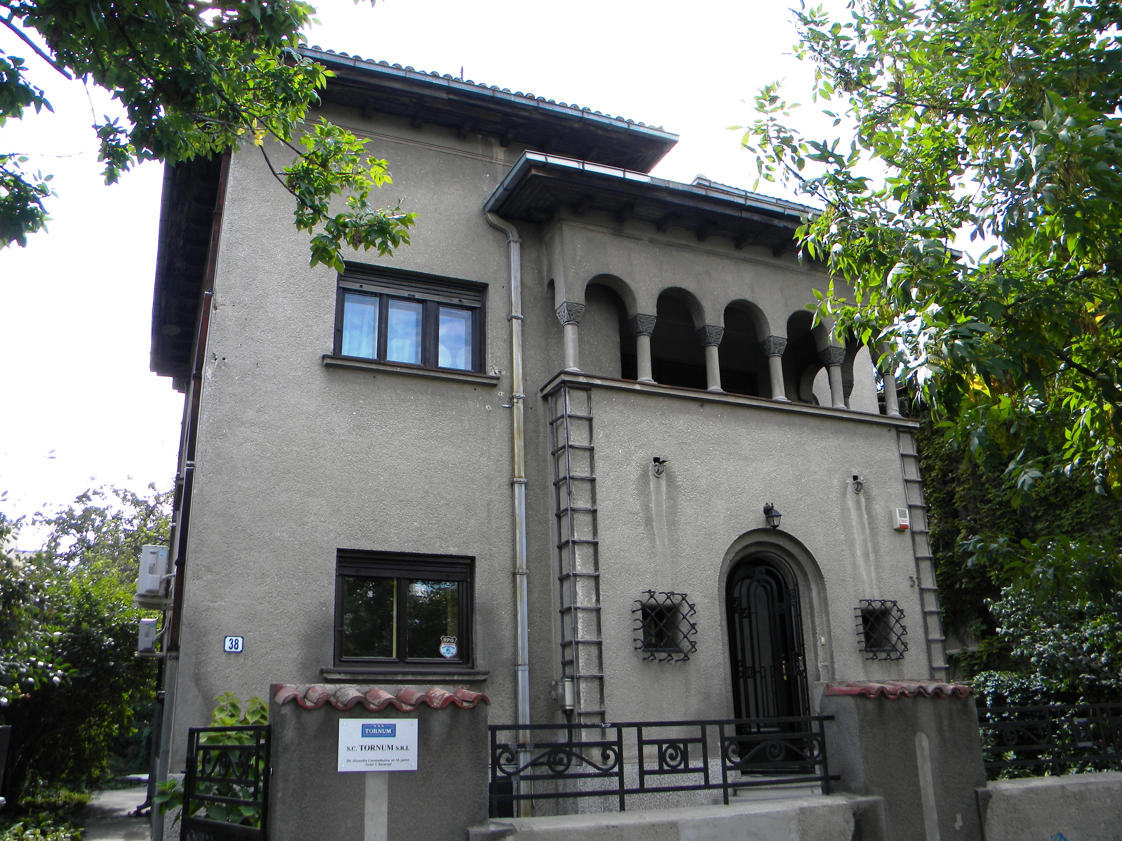 Bucuresti, Romania, Str. Alexandru Constantinescu nr. 38; B-II-m-B-18476